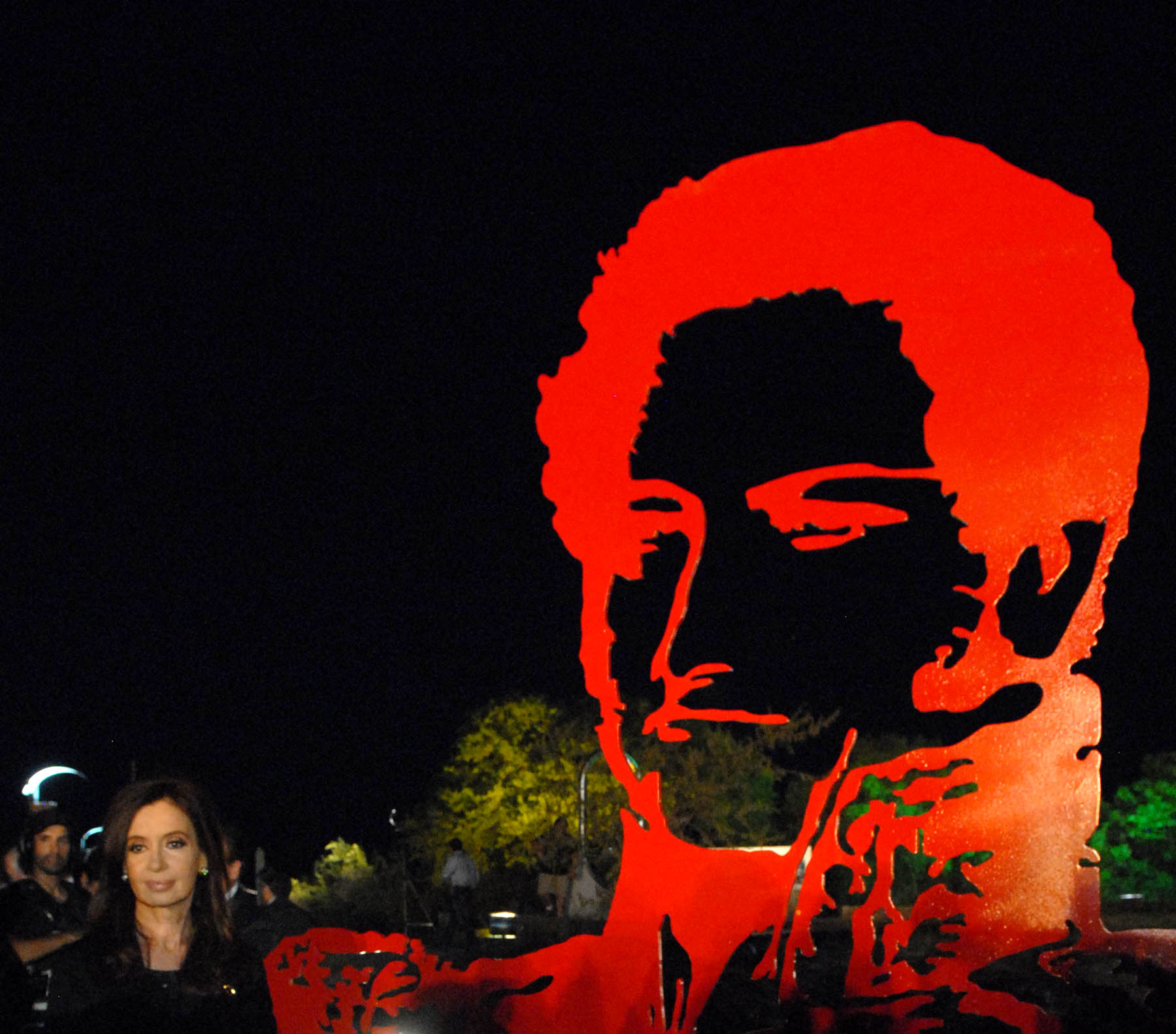 La Presidenta junto a una imagen de Juan Manuel de Rosas